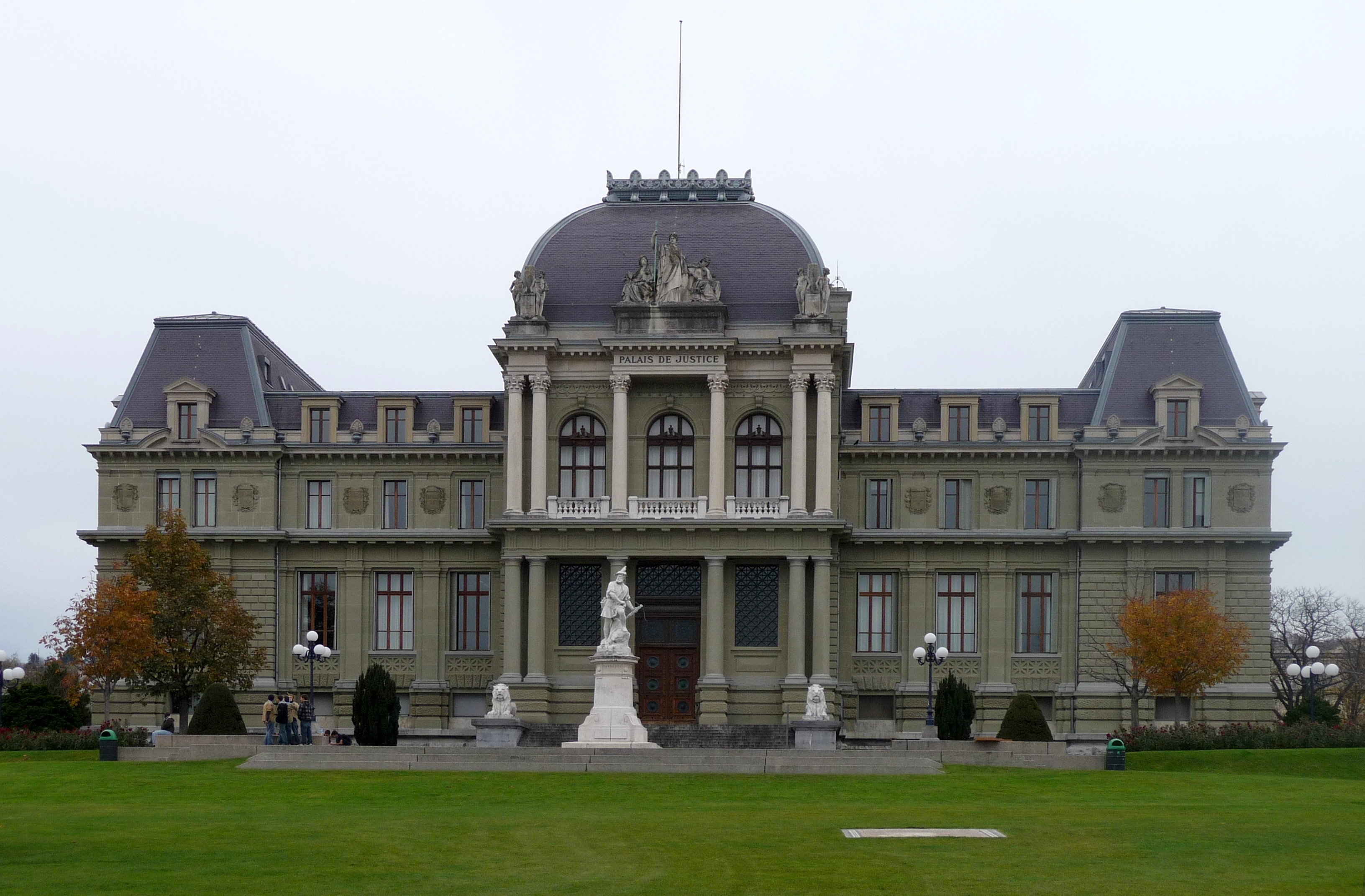 Palais de Justice à Lausanne.